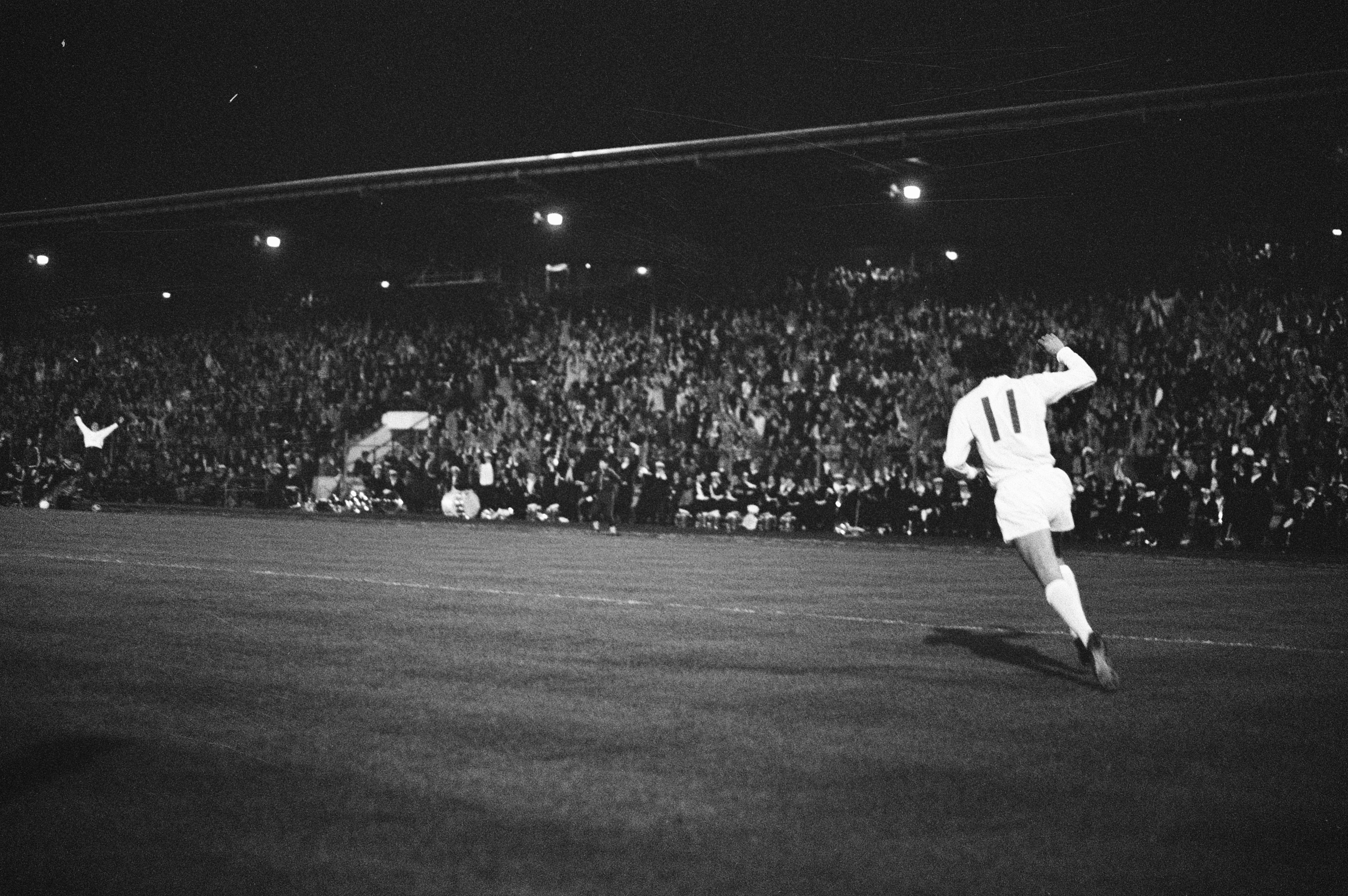 Collectie / Archief : Fotocollectie Anefo Reportage / Serie : [ onbekend ] Beschrijving : PSV tegen Real Madrid 2-0 [Eef Mulders heeft 1-0 gescoord] Annotatie : Wedstrijd werd gespeeld in stadion De Vliert te Den Bosch Datum : 3 november 1971 Trefwoorden : sport, voetbal Persoonsnaam : Mulders, Eef Instellingsnaam : Real Madrid Fotograaf : Mieremet, Rob / Anefo, [onbekend] Auteursrechthebbende : Nationaal Archief Materiaalsoort : Negatief (zwart/wit) Nummer archiefinventaris : bekijk toegang 2.24.01.05 Bestanddeelnummer : 925-1047